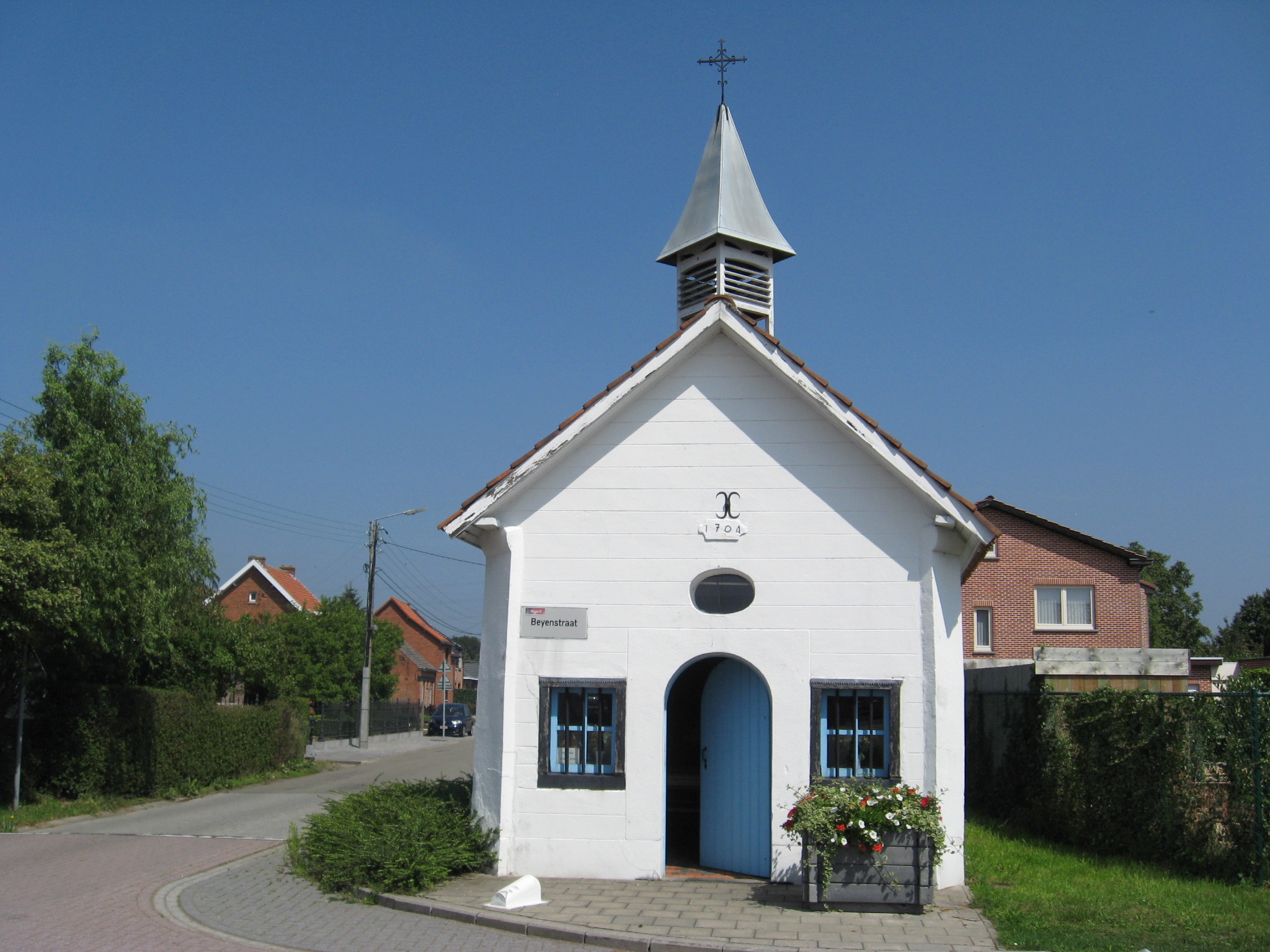 Sint-Janskapel, voormalige Onze-Lieve-Vrouwekapel in Kuringen